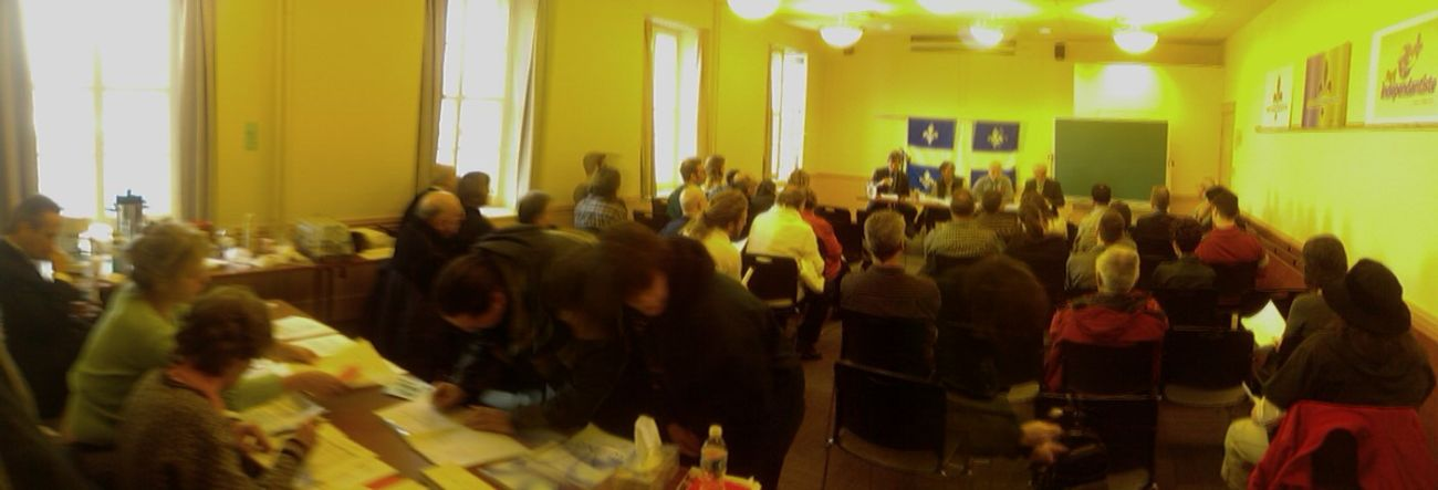 Assemblée de fondation du Parti indépendantiste